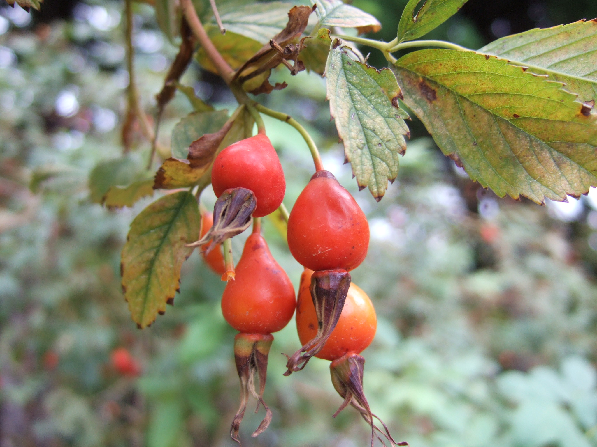 Rosa acicularis subsp. acicularis var. nipponensis (Crép.) Koehne (syn. Rosa nipponensis Crepin), rosehips